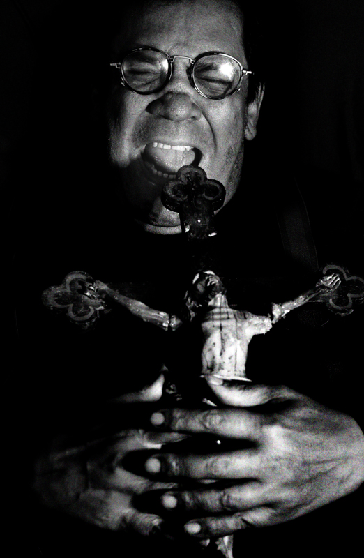 Carlos Mayolo, film director from Colombia.